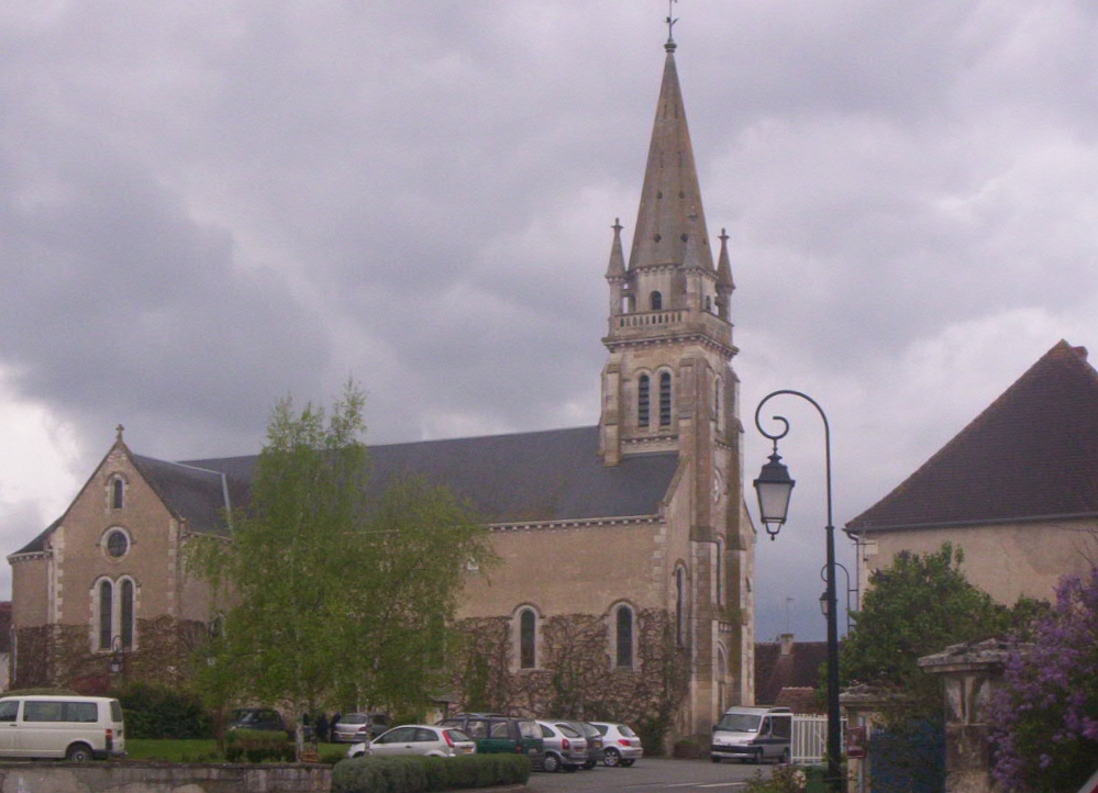 Église de Journet (Vienne)